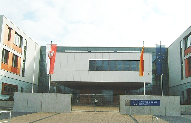 Eingang der europäischen Schule in Frankfurt, Nordweststadt, Stadtteil Praunheim.